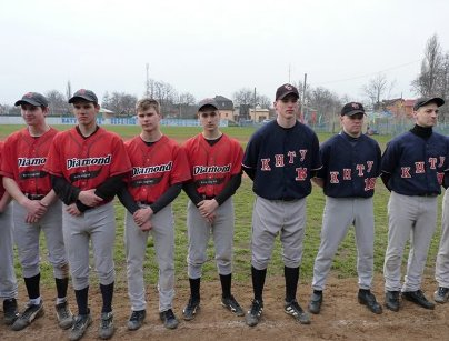 Андрій Ніколаєнко відкрив у Кіровограді бейсбольні змагання на Кубок В’ячеслава Колодицького